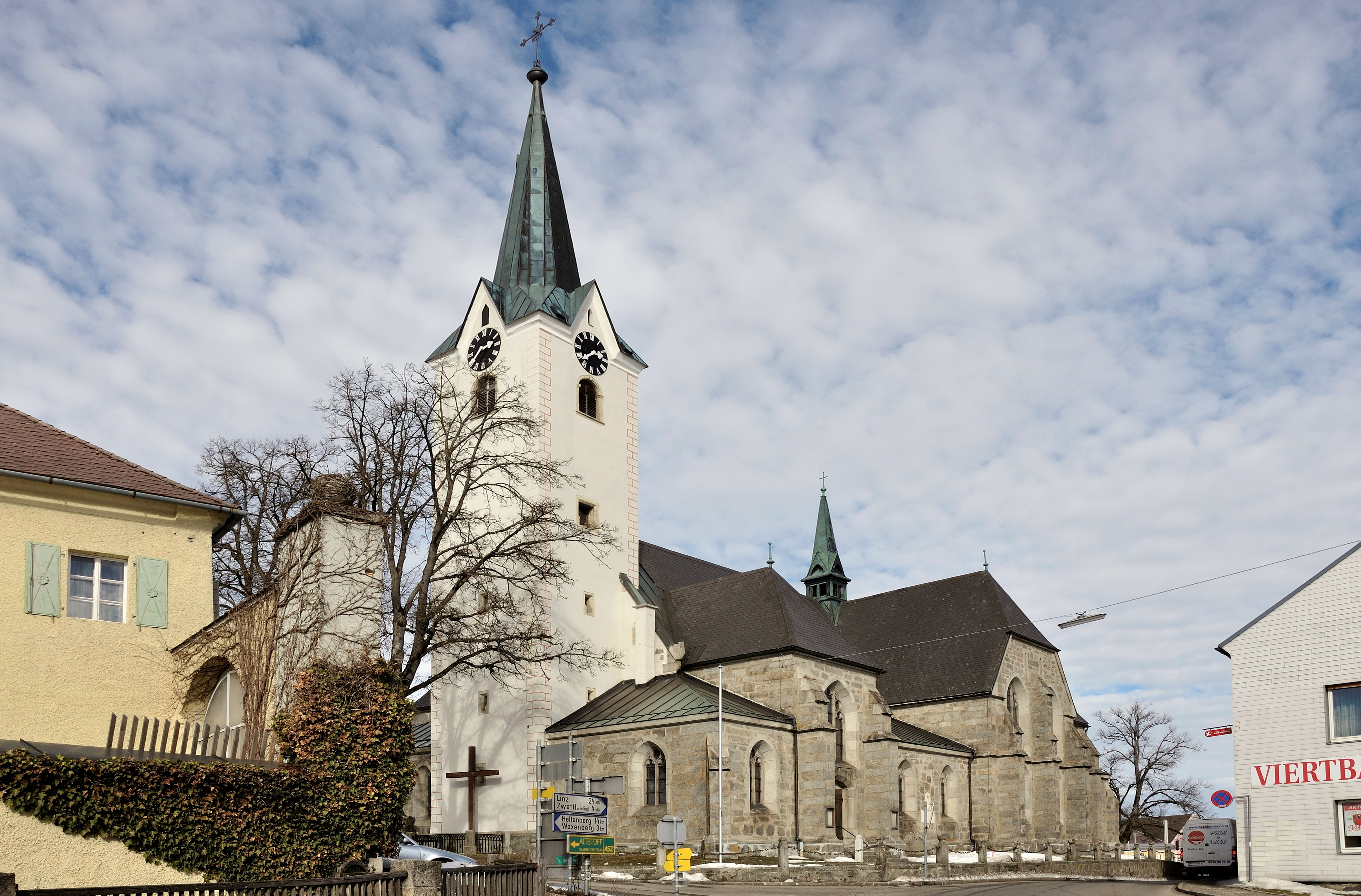 Kath. Pfarrkirche hl. Apostel Jakobus